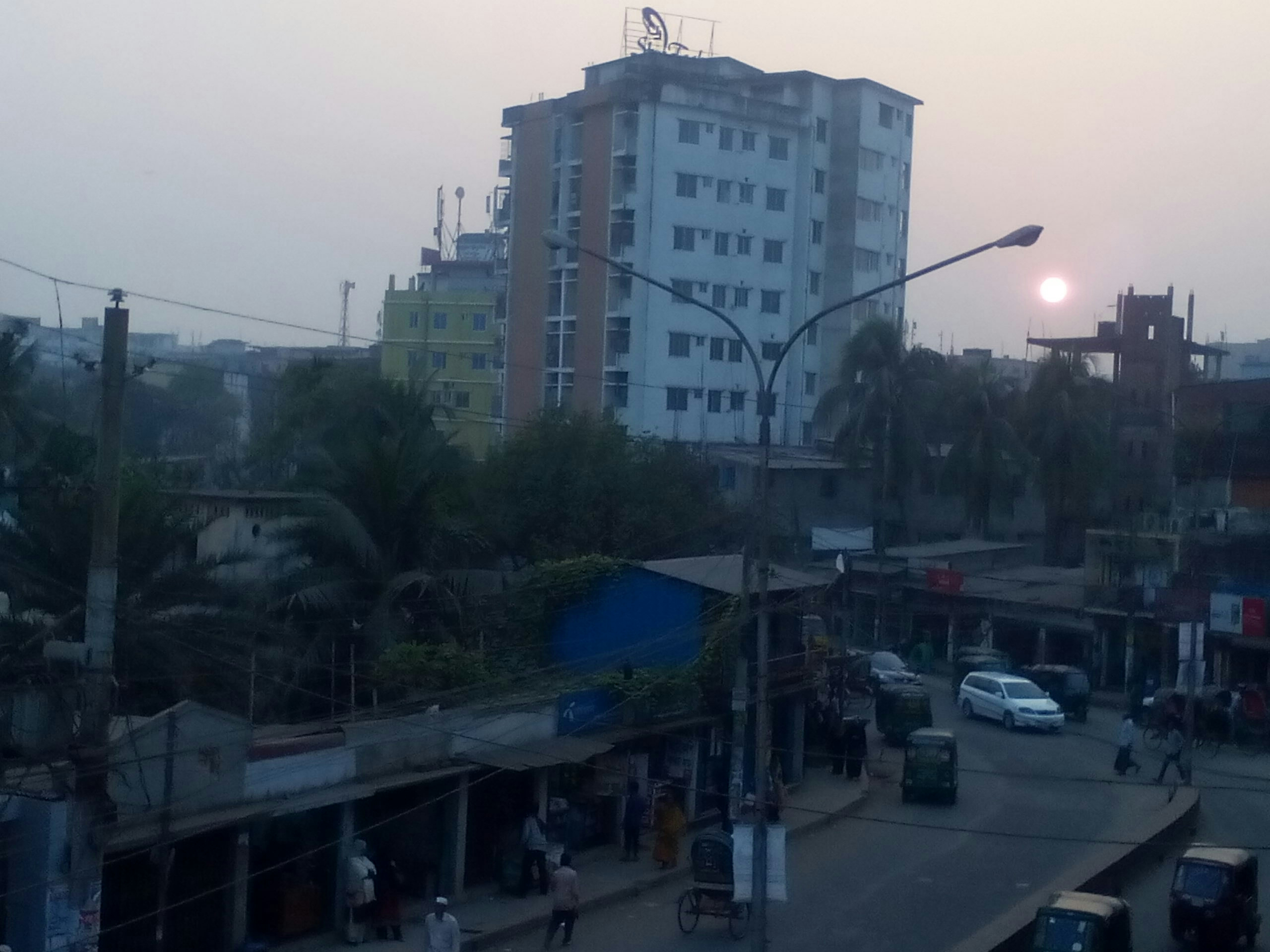 চকবাজার ১